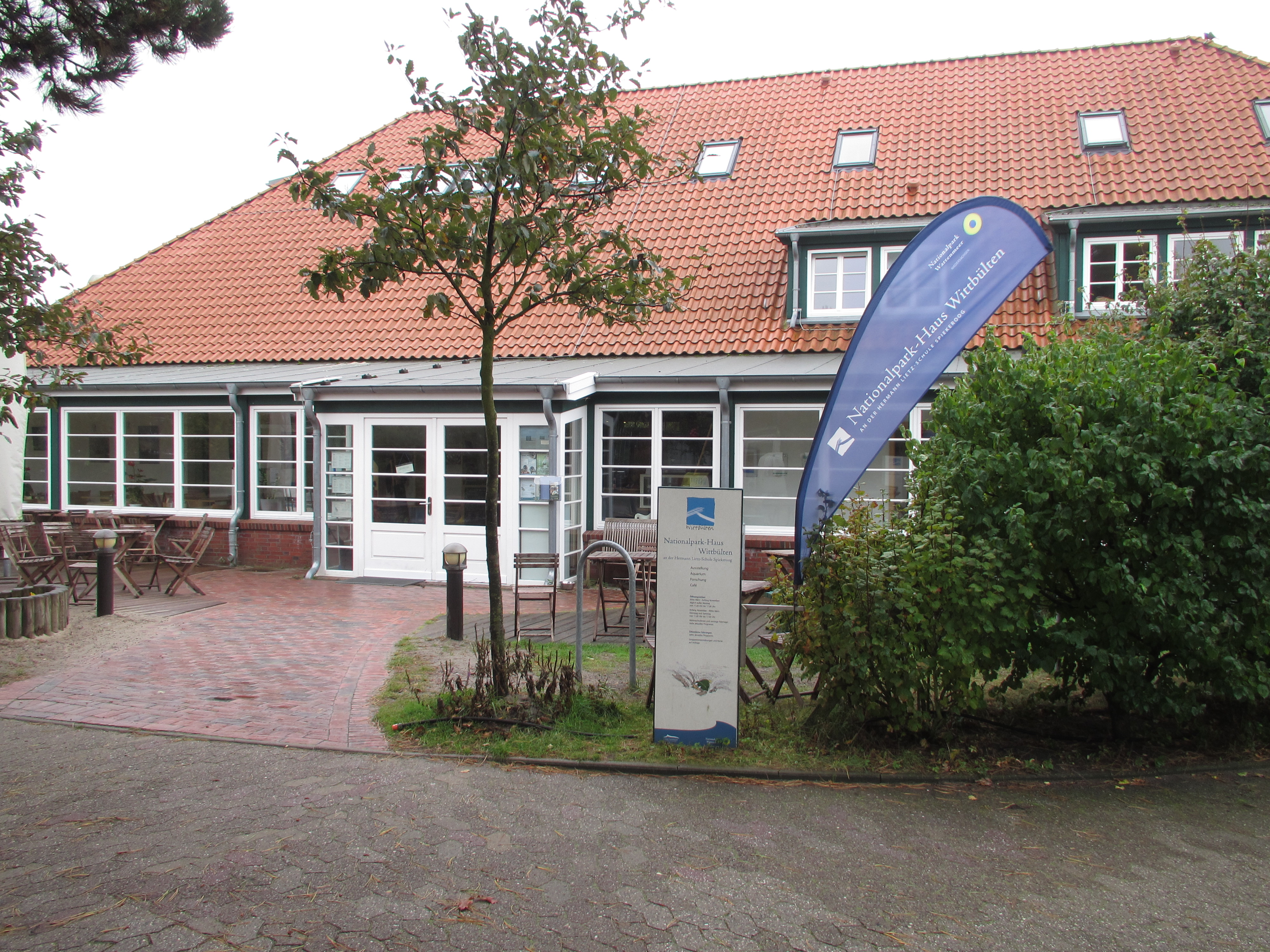 Spiekeroog: Nationalpark-Haus Wittbülten an der Hermann Lietz-Schule (